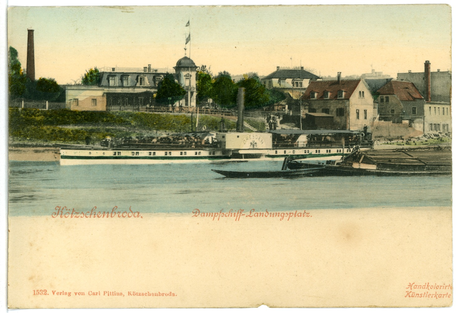 Kötzschenbroda; Landungsplatz der Dampfschiffe This postcard is from publisher Brück & Sohn in Meißen ( postcard has a unique number 01532 and is available in a higher resolution at the publisher. This images was uploaded in a cooperation project between Wikipedians and the publisher.